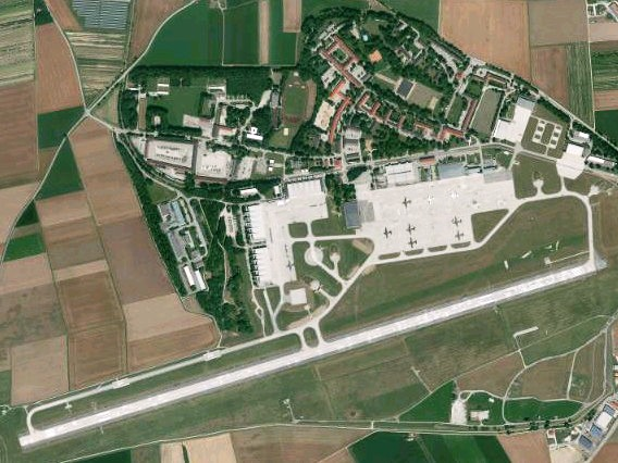 Luftaufnahme der Bayerischen Vermessungsverwaltung: Fliegerhorst Landsberg/Lech in Penzing, Landkreis Landsberg am Lech, Bayern.